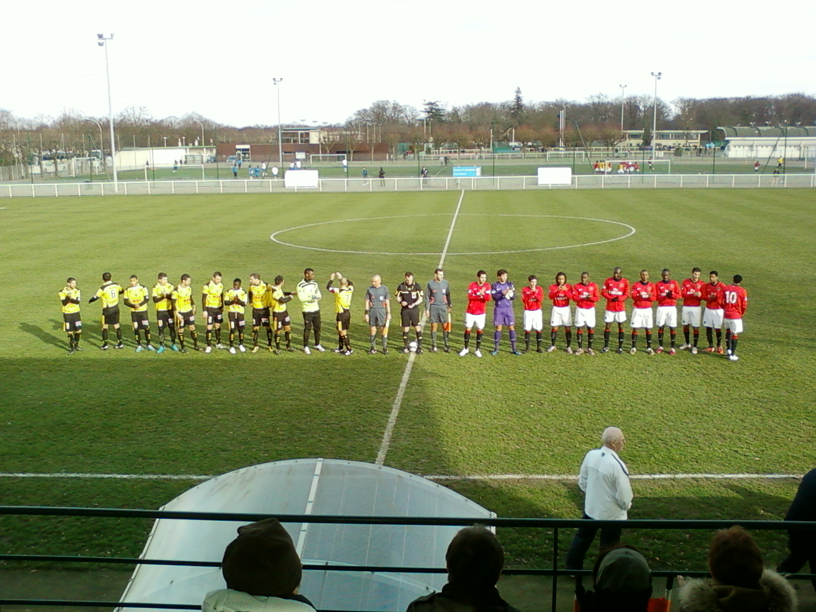 Présentation des équipes lors du match PSG B - Monts d'Or du 06 février 2011